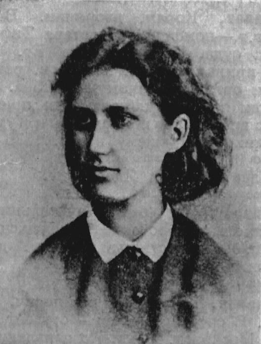 Marija Petrovna Negreskul (1851-1919), moglie di Michail Negreskul e figlia di Petr Lavrov